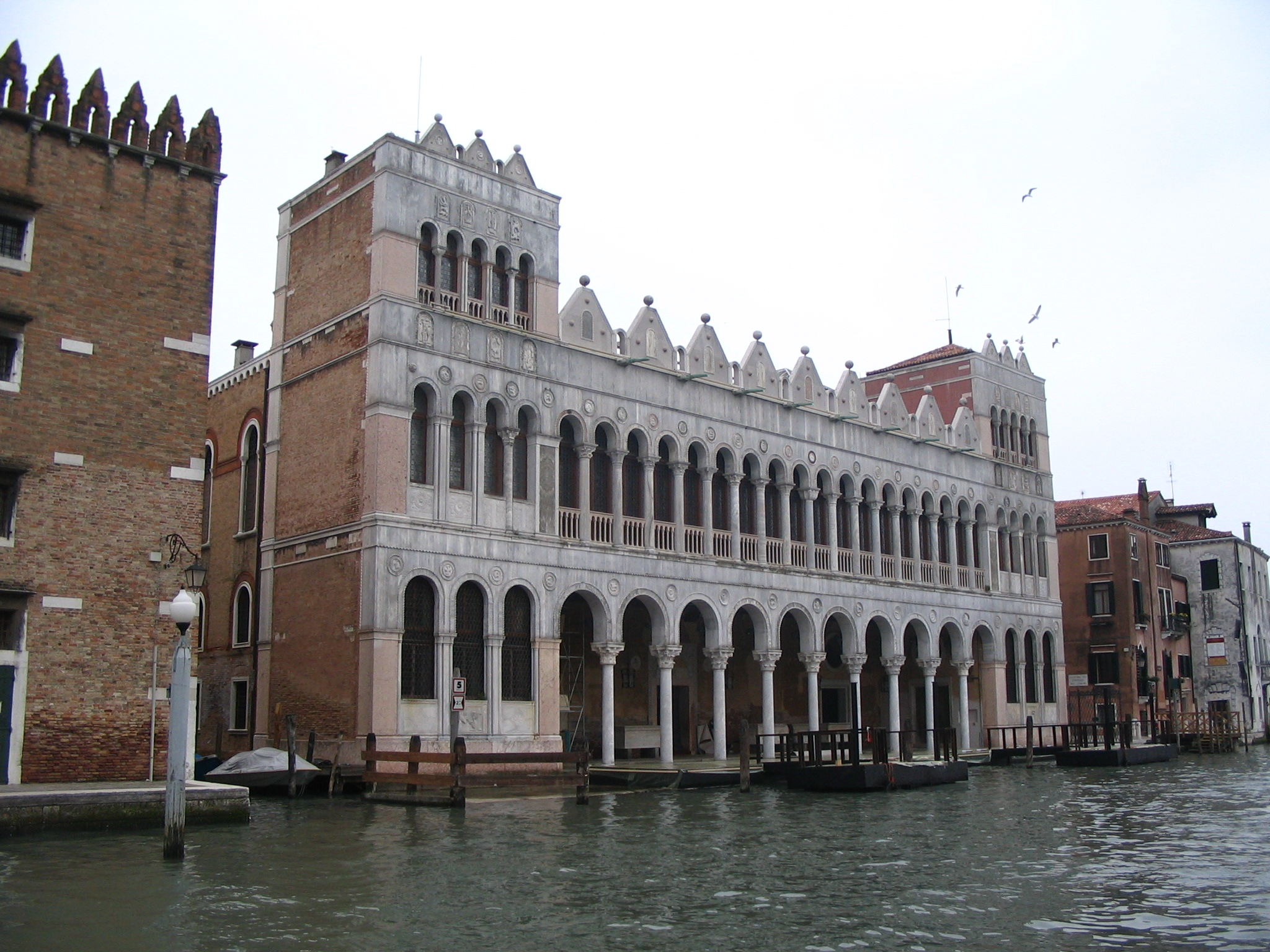 Fondaco dei Turchi (Venice)